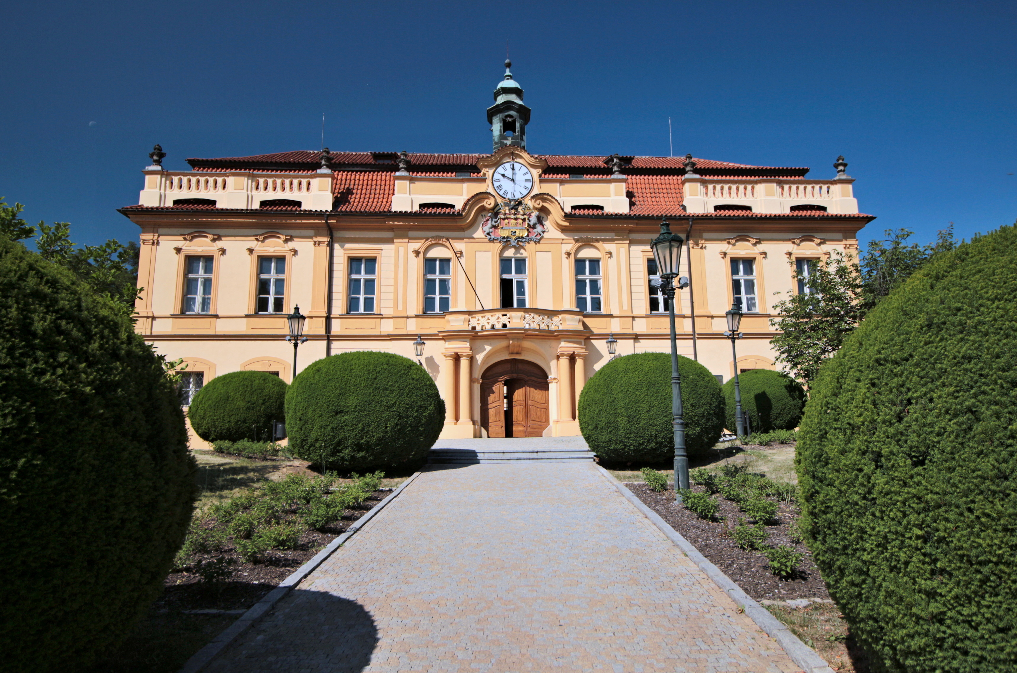 Libeňský zámek